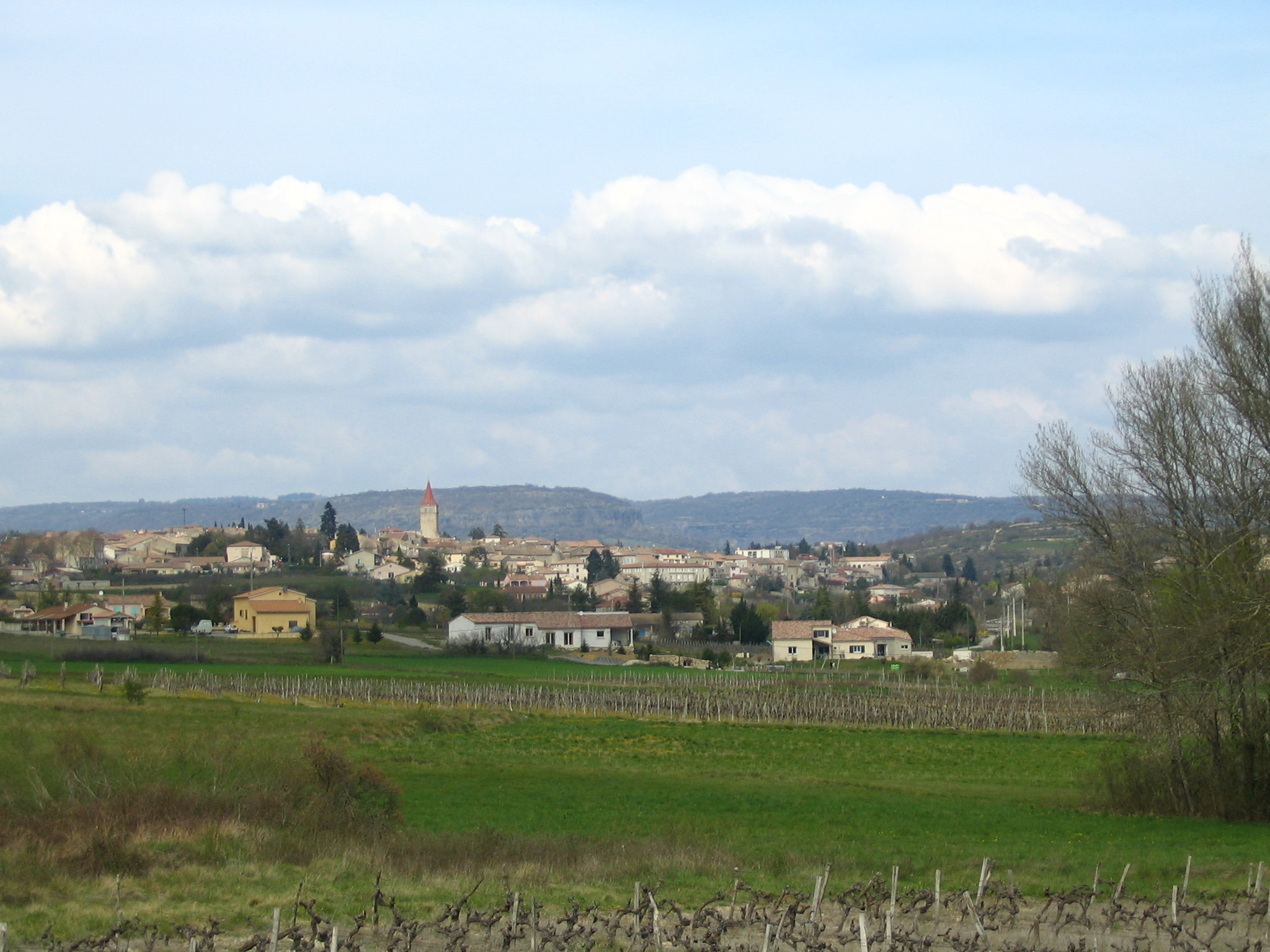 Village Villeneuve-de-Berg in the Ardèche region, France